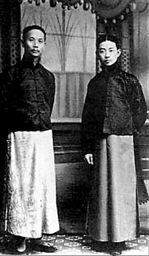 梅兰芳（右）与齐如山